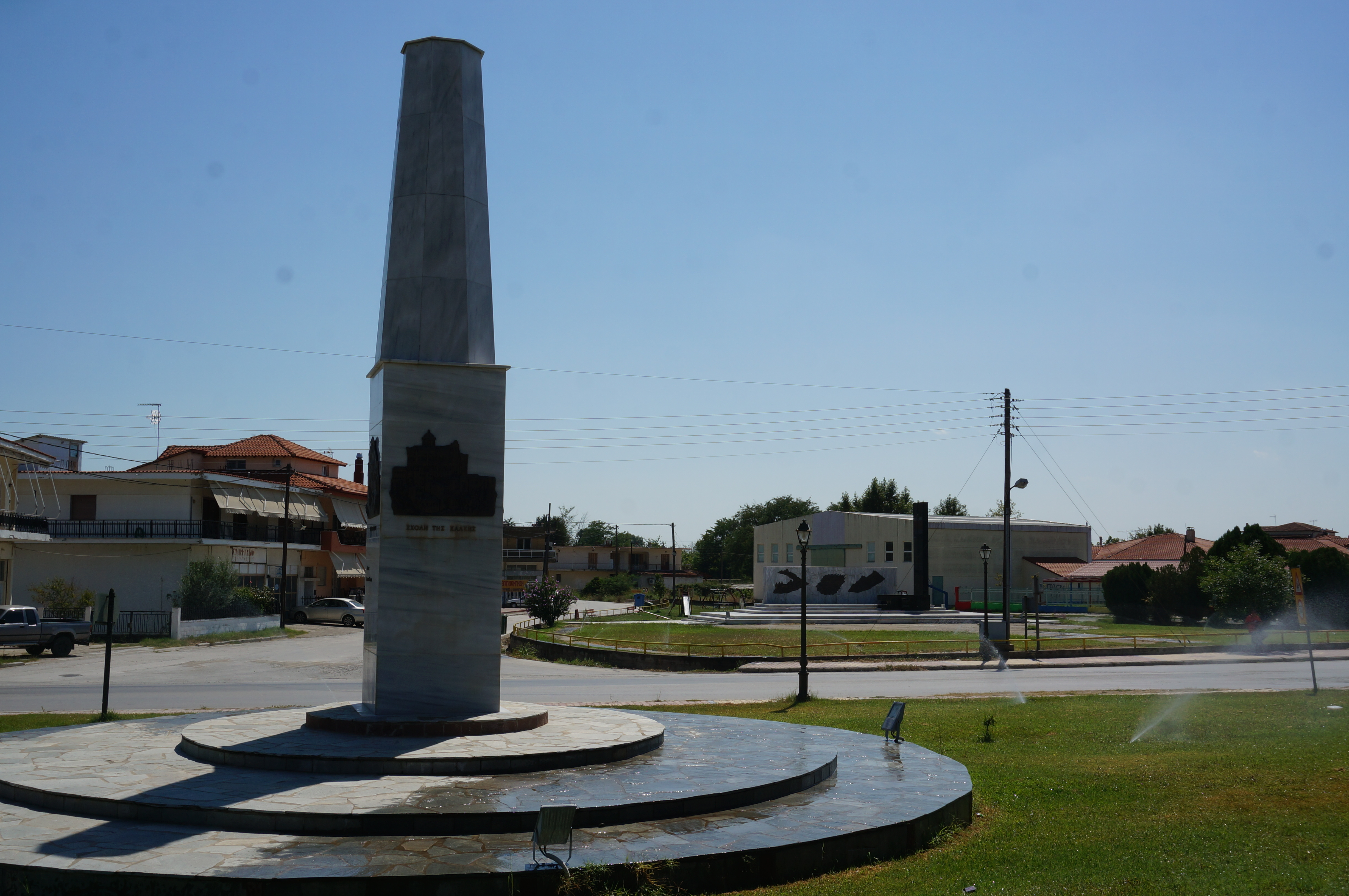 à polycastro.